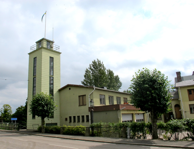 Brandstationen i Nossebro, Västergötland